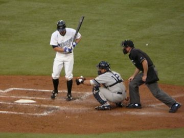 Joe Inglett 19:17, 6 September 2008 . . DinoZon . . 360×270 (45 KB)